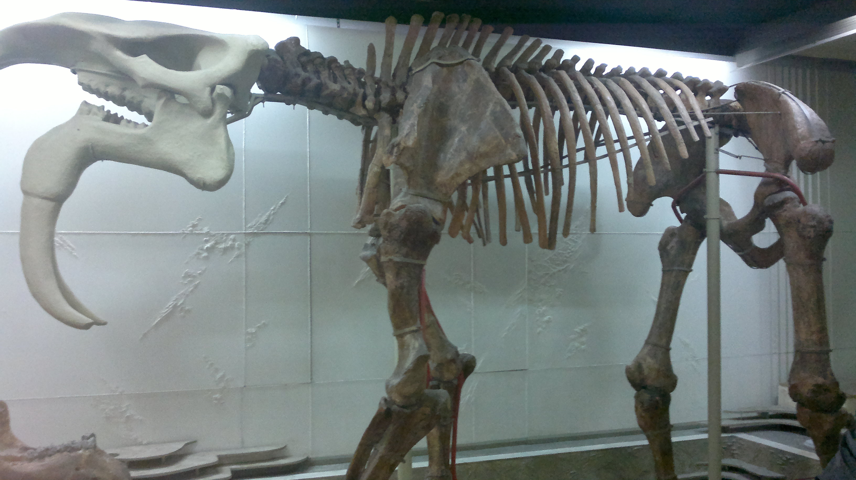 Scheletul parțial al unui Deinotherium gigantissimum la Muzeul Național de Etnografie și Istorie Naturală din Chișinău.